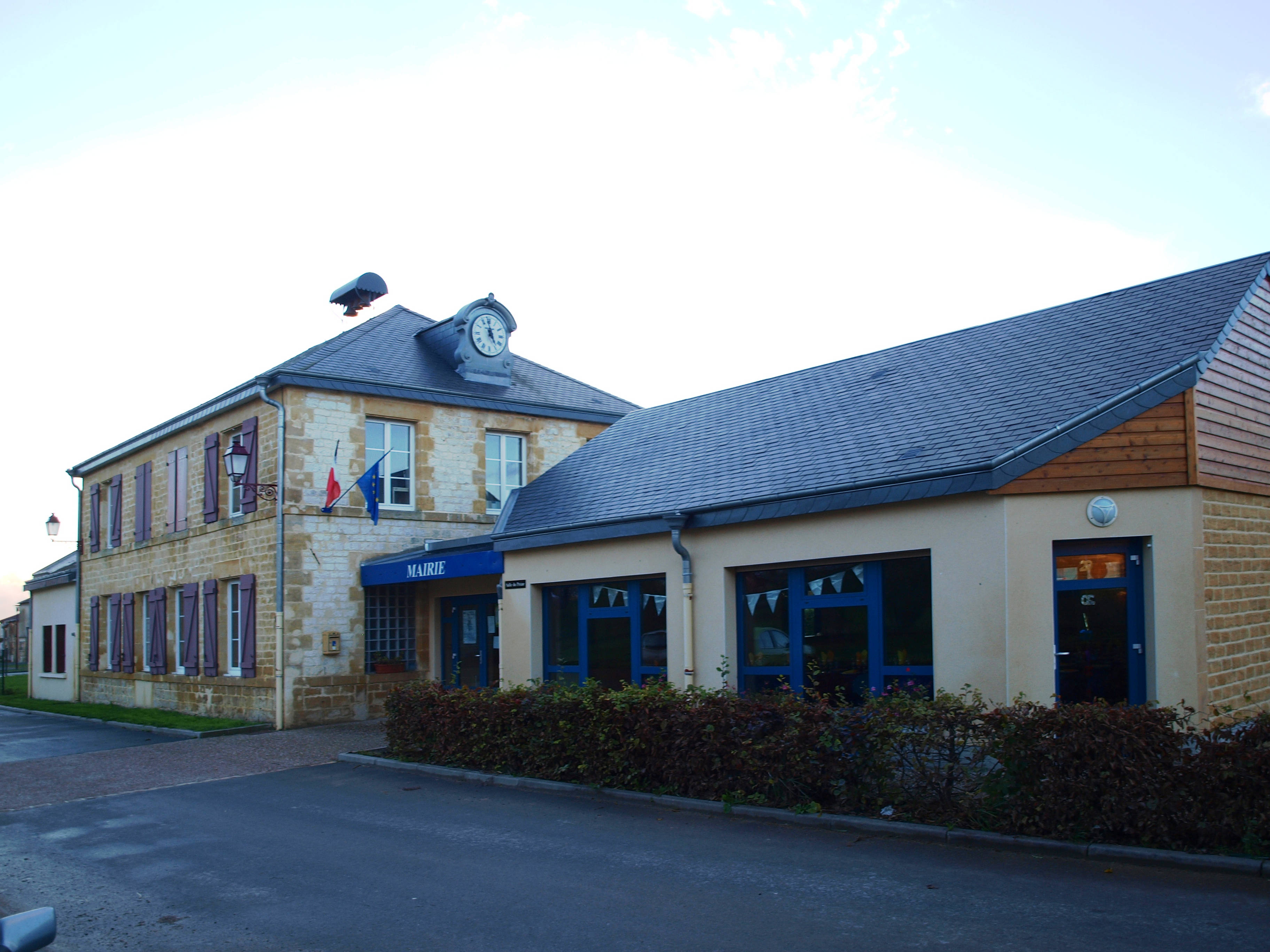 Les Petites-Armoises (Ardennes, France) ; mairie.